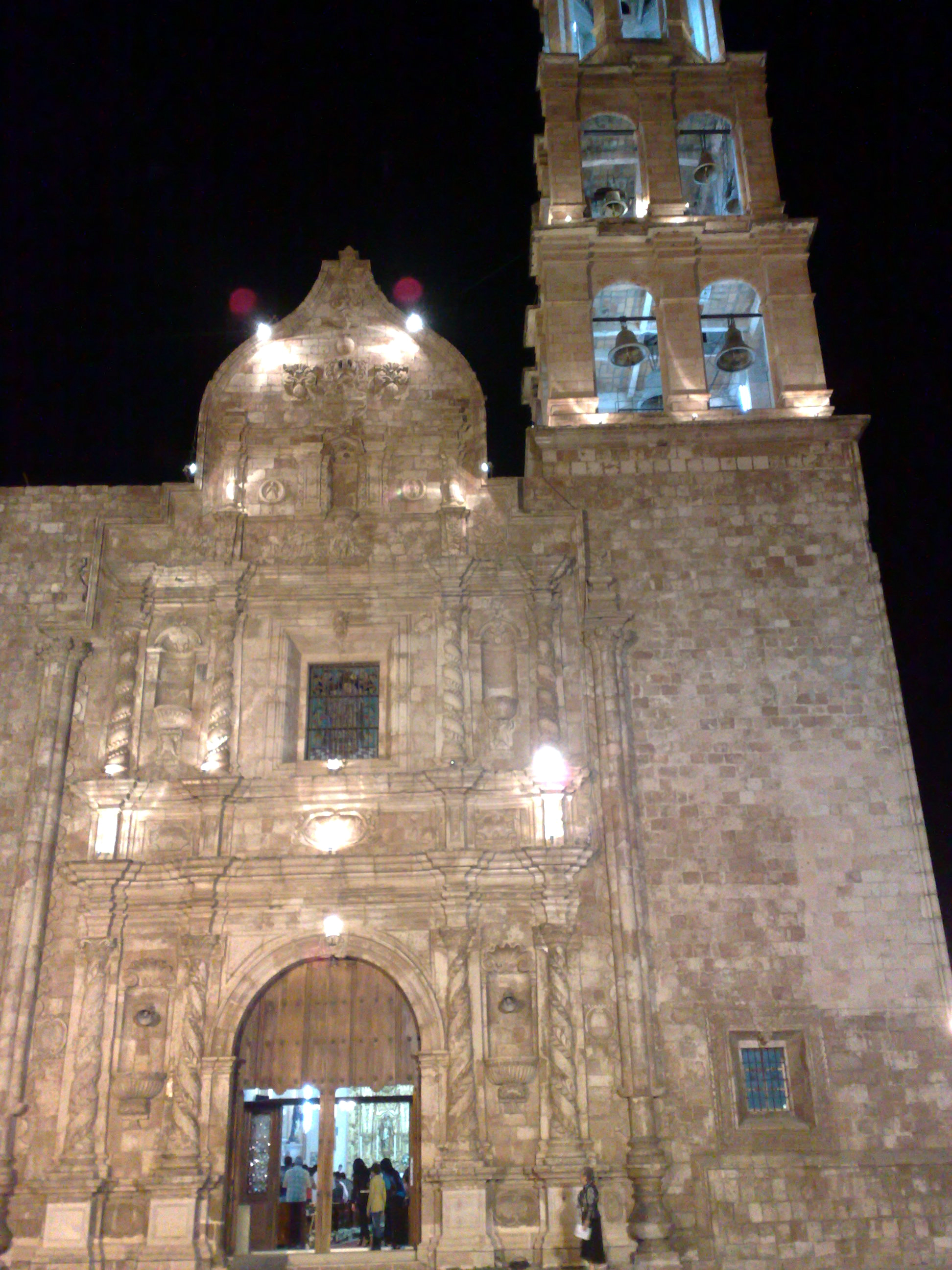 Fachada principal de la Iglesia de Nuestra Señora del Rosario, Rosario, Sinaloa, Mexico